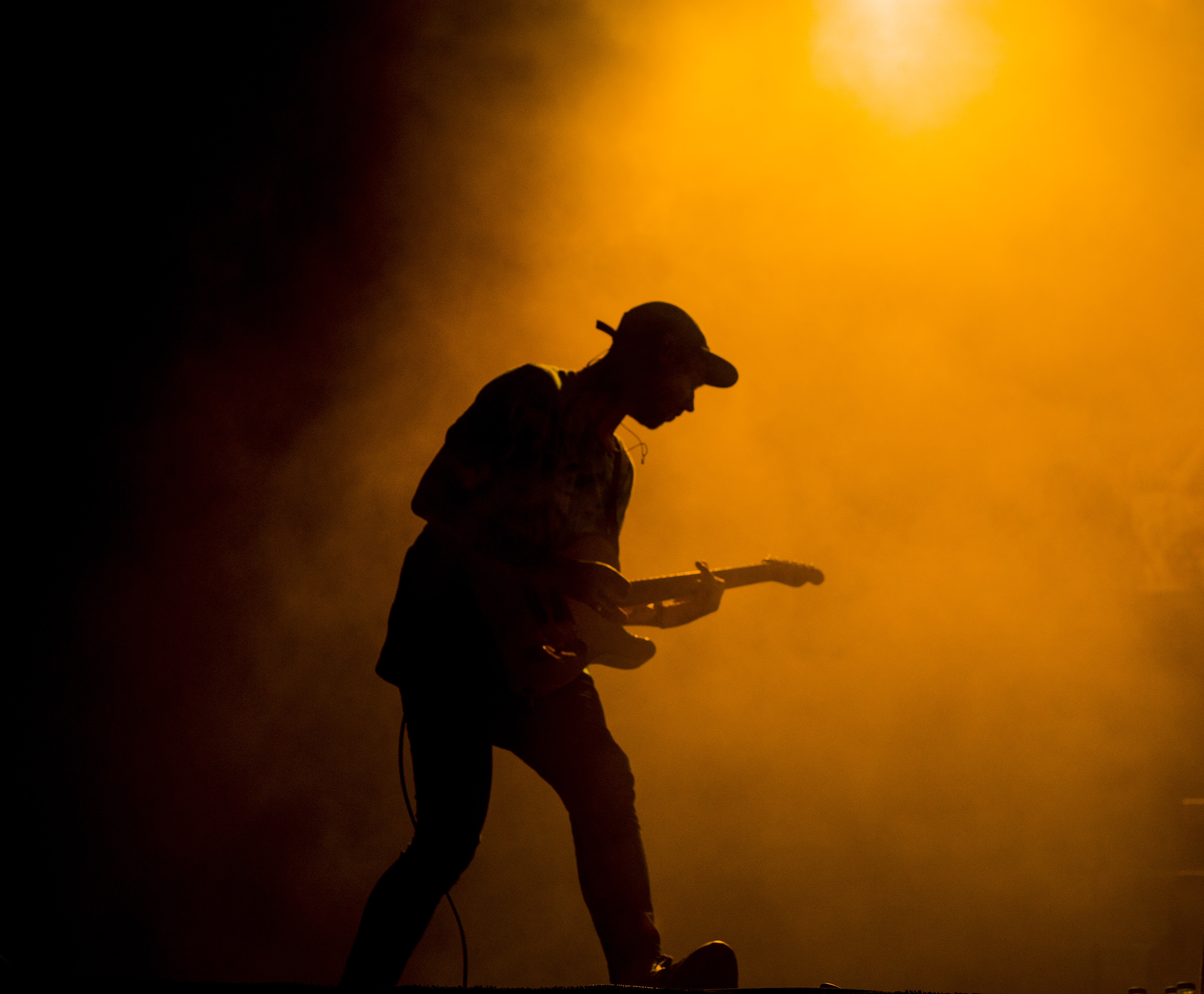 FIB 2015 JaimeT